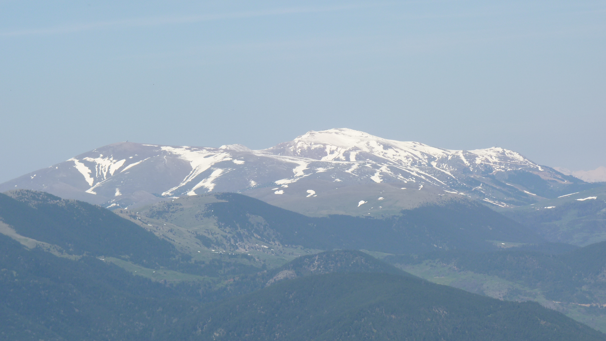 Tossa d'Alp i Puigllançada, des del Taga